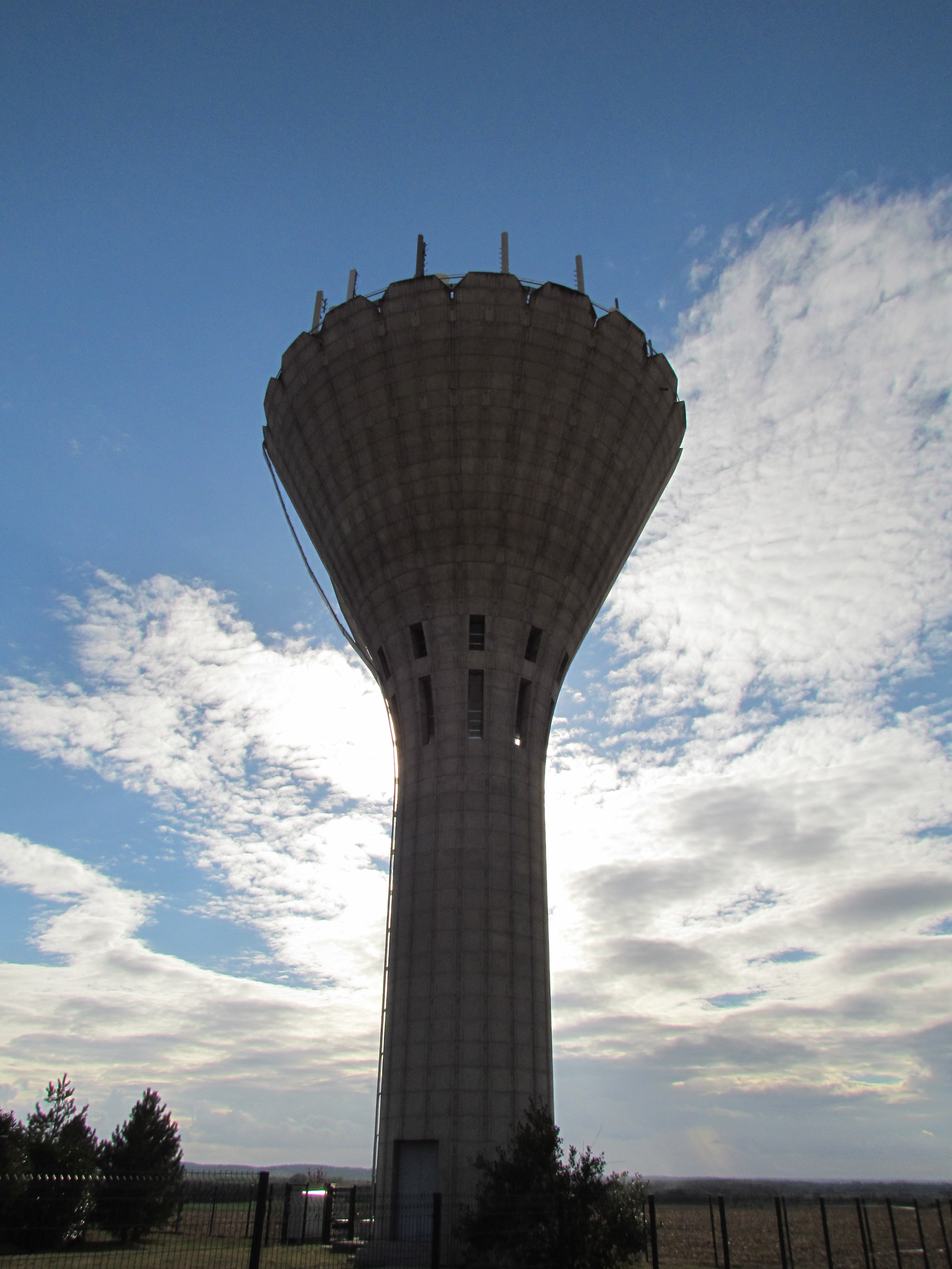 Château d'eau de Misy-sur-Yonne, Seine-et-Marne, France